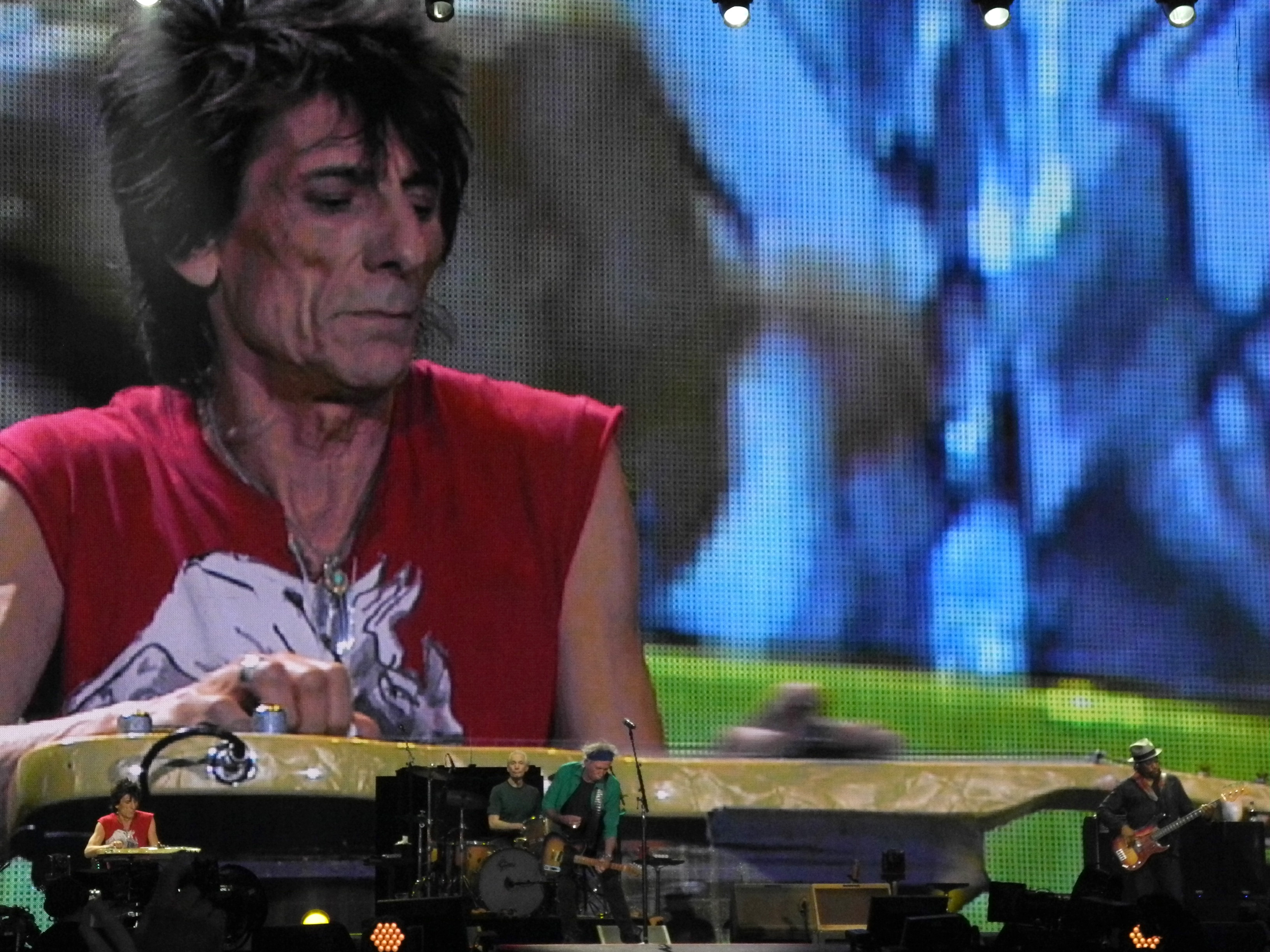 Concerto dei Rolling Stones ad Hyde Park per il tour '50 and counting...' del 2013, Ron Wood